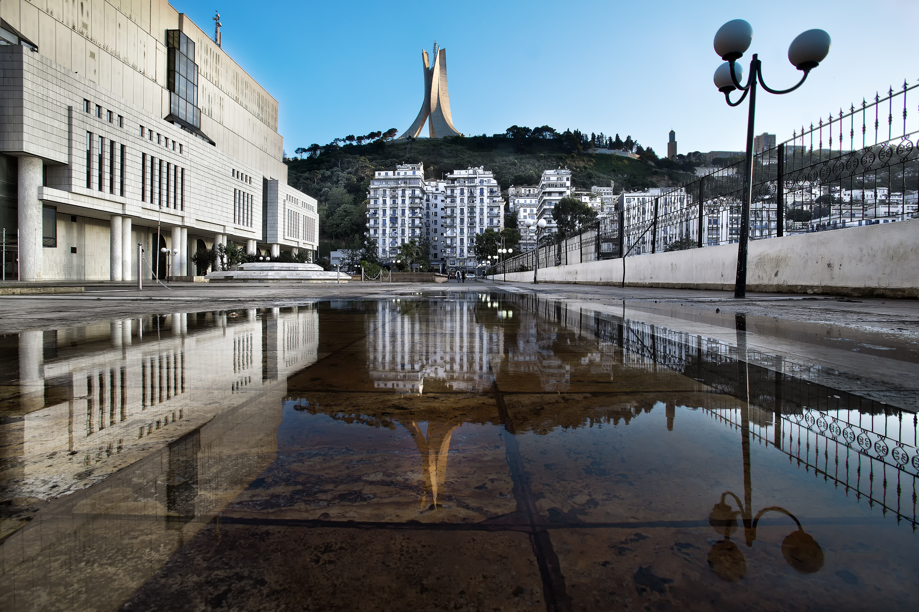 Vue du monument depuis la contre-allée de la bibliothèque nationale. Sanctuaire du martyr - Alger -169 Monument of the Martyrs and National Library of Algeria